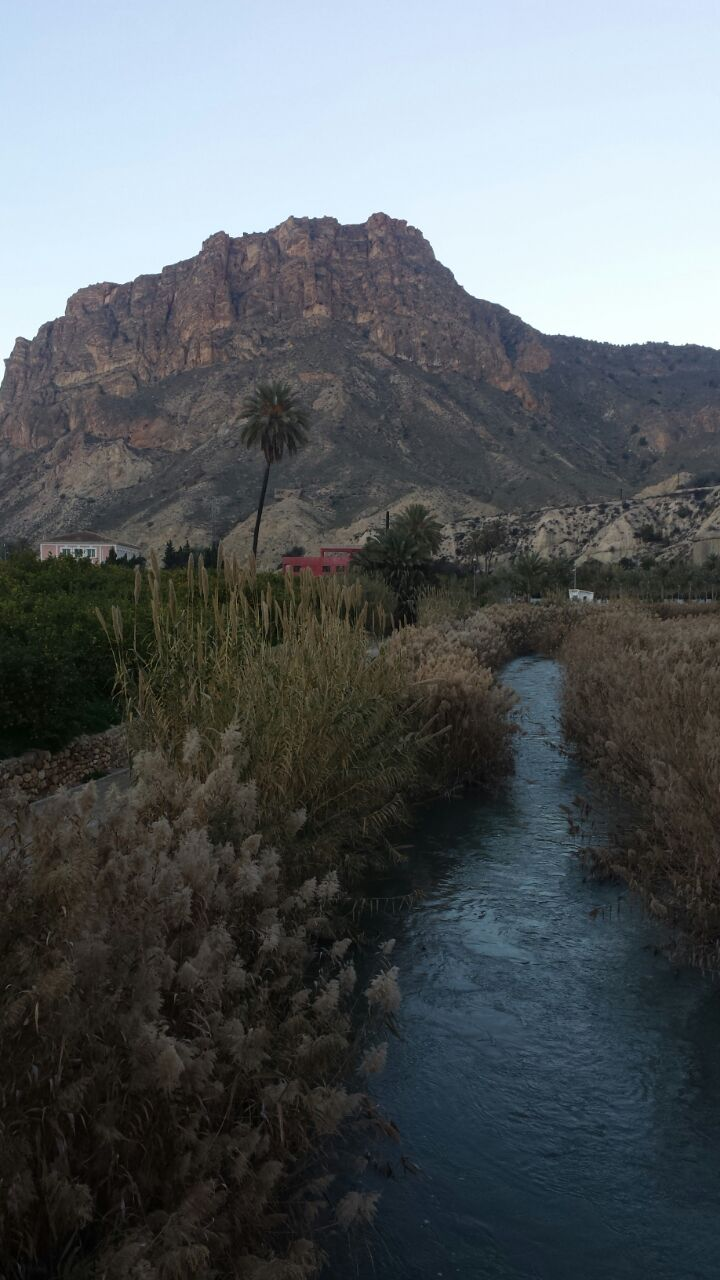 Imagen del río Segura a su paso por la huerta de la localidad de Ojós (Región de Murcia, España). Paraje del morisco Valle de Ricote.